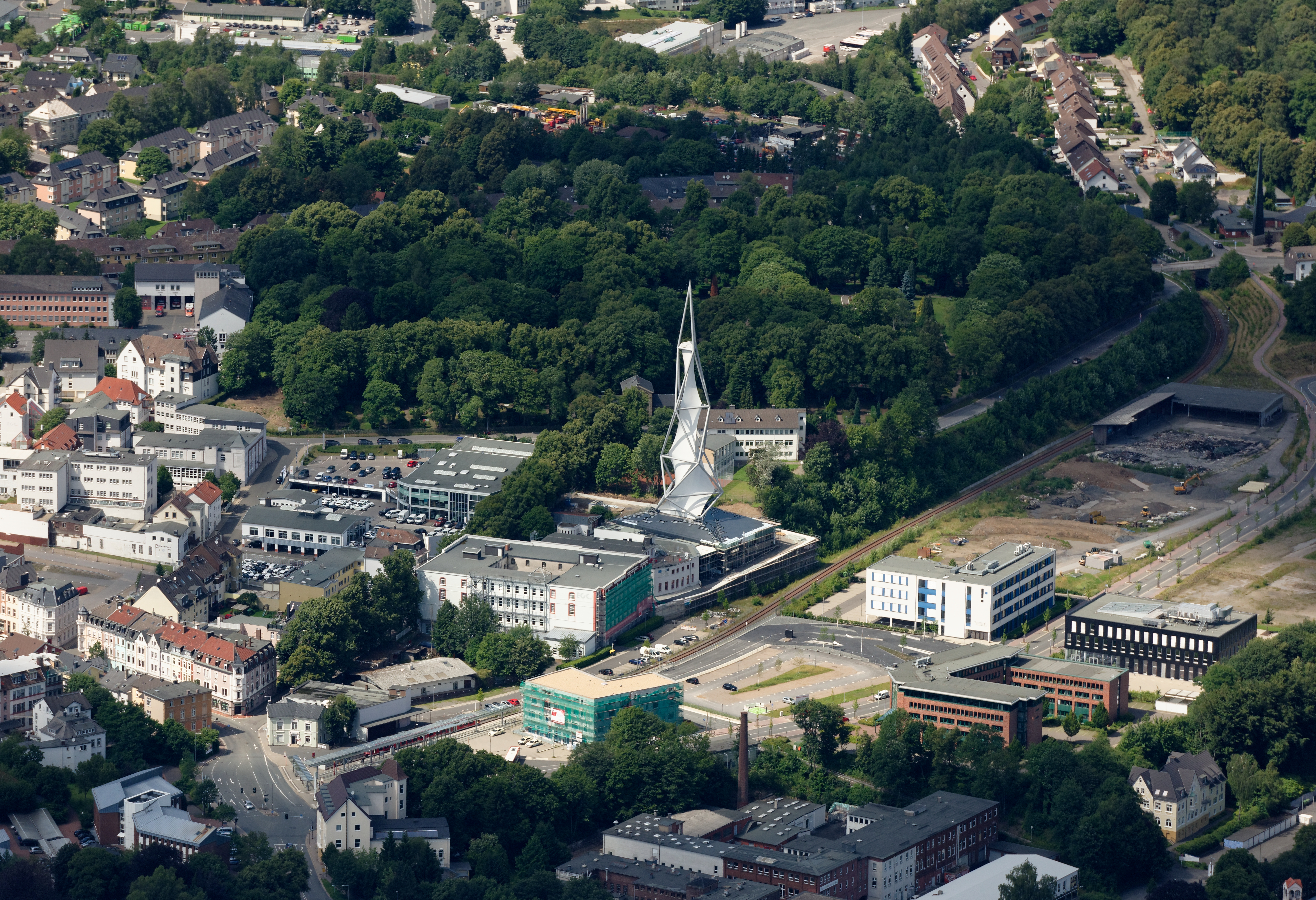 The making of this document was supported by the Community-Budget of Wikimedia Germany. Haltepunkt, Bahnstrecke Brügge–Lüdenscheid, Lüdenscheider Finanzamt, Alter Friedhof und Phänomenta Lüdenscheid